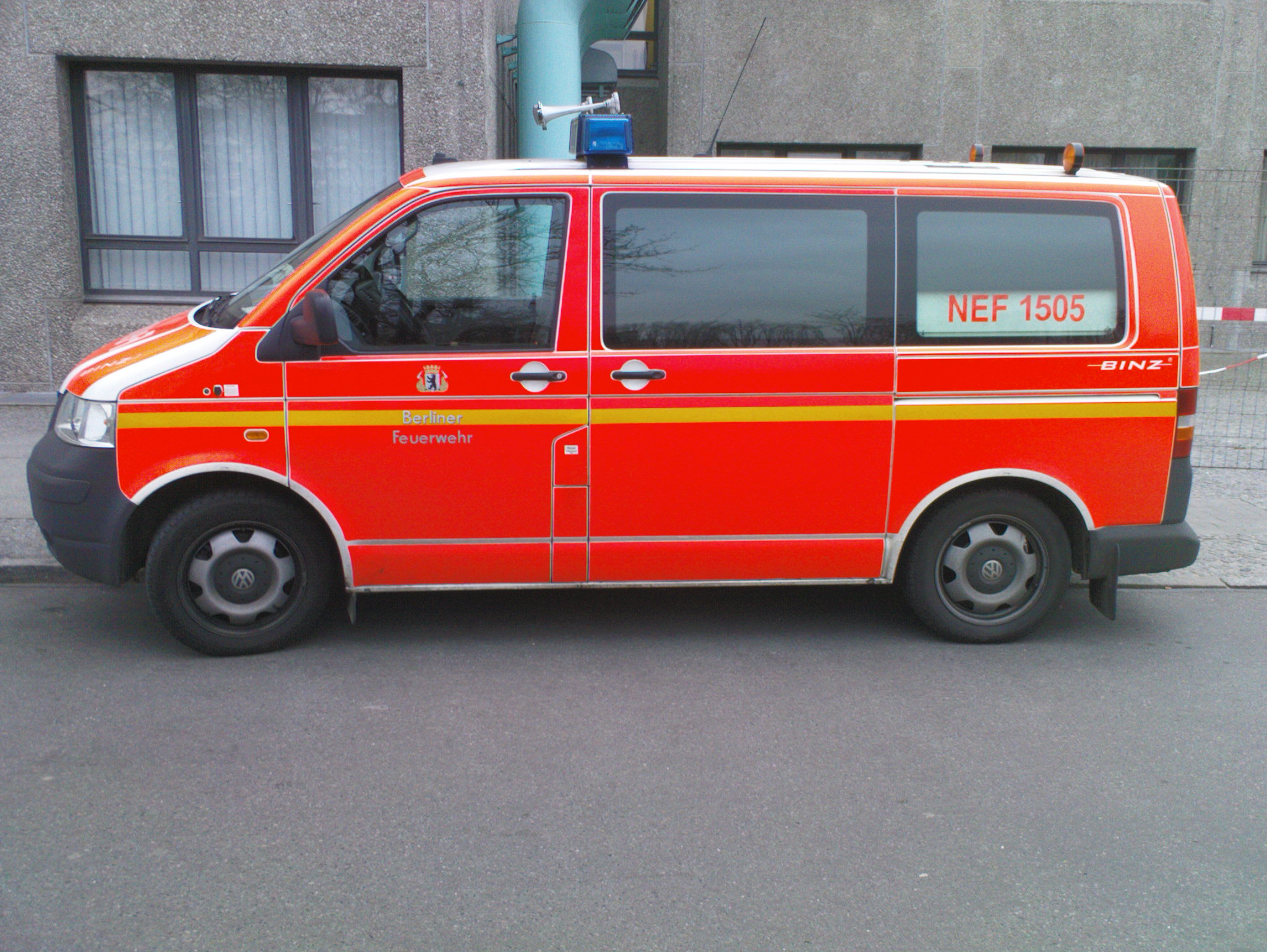 Noteinsatzfahrzeug der Feuerwehr Berlin